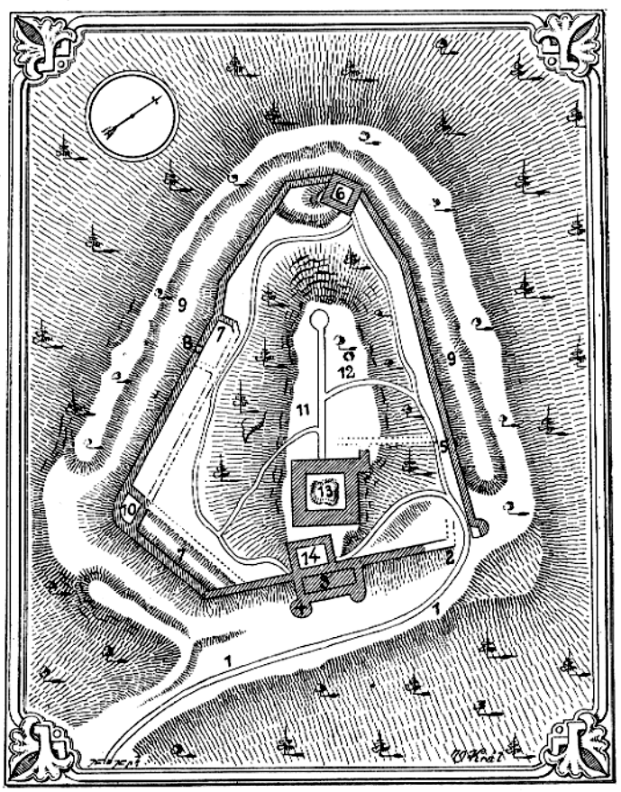 Nový Herštejn – půdorys hradu od Vojtěcha Krále z Dobré Vody publikovaný roku 1891; Popis: 1 – cesta, 2 – brána, 3 – budovy podél hradeb, 4 – Panenská věž, 5 – druhá brána, 6 – věž, 7 – hospodářské budovy, 8 – branka do příkopu, 9 – příkop, 10 – věž, 11 – horní hrad, 12 – studna, 13 – palác, 14 – budova